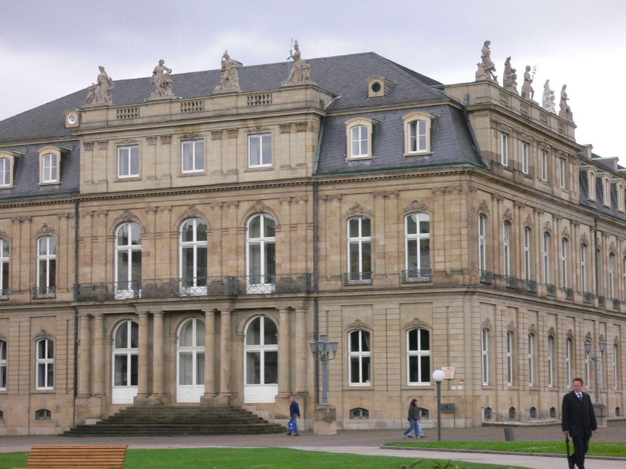 Neues Schloss Stuttgart, Blick auf die Stirnseite (links) und den Endrisalit des Gartenflügels.